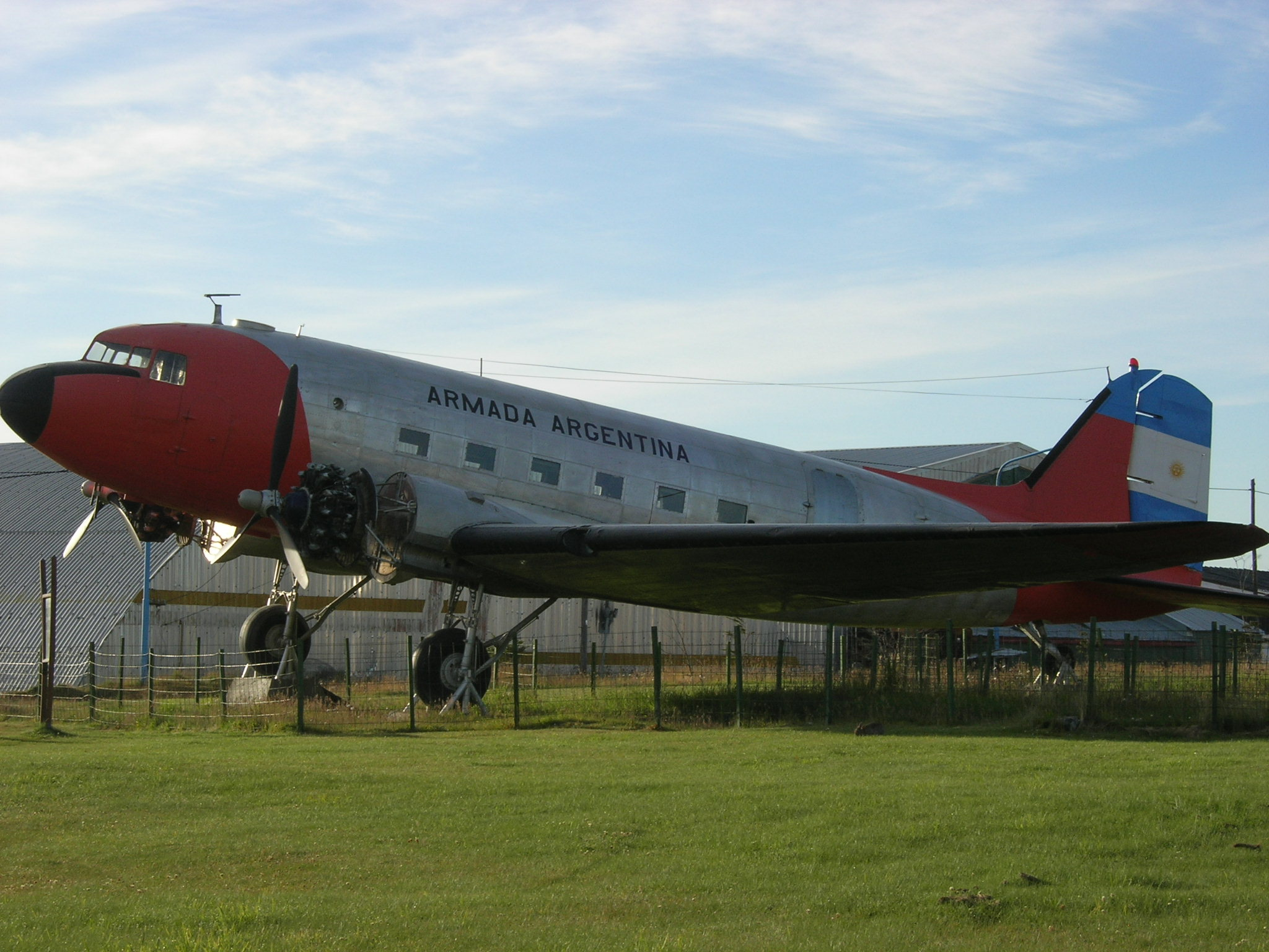 Avión DC 3 denominado 5 Tango 22 Cabo de Hornos - Usuahia